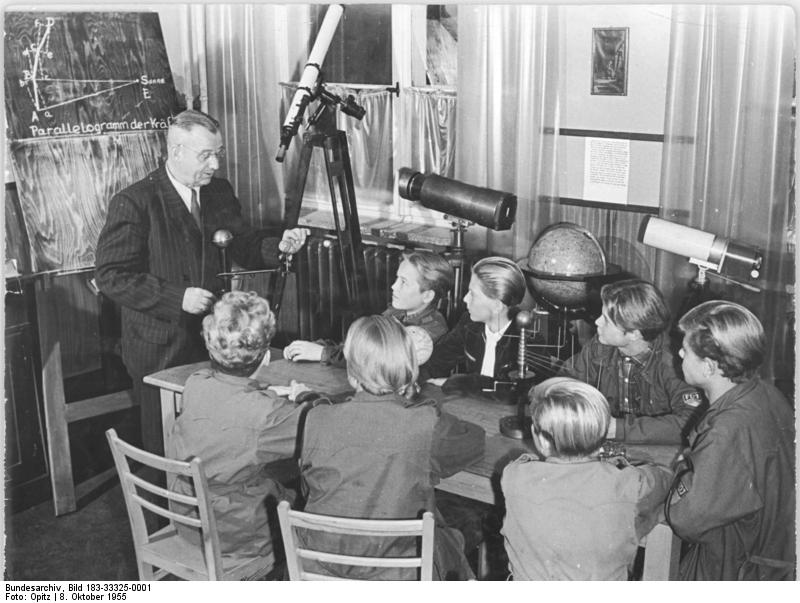 Leipzig, Jugendstunden, Physikunterricht Zentralbild Bez. Red. Leipzig 8.10.1955 Opitz 1 Mot. Jugendstunden zur Vorbereitung der Jugendweihe begannen In der Sternwarte Eilenburg, die jetzt auf Beschluß des Ministerrats ausgebaut werden soll, führt der Leiter, Herr Edgar Otto, die Schulabgänger in die Himmelskunde ein. Zirka 400 Schulabgänger, die aus allen Kreisen des Bezirkes Leipzig kamen, nahmen im vergangenen Jahr an den Jugendstunden teil. Die Gesellschaft zur Vorbereitung wissenschaftlicher Kenntnisse wird Lehrkräfte bereitstellen, um einen größeren Kreis Jugendlicher betreuen zu können. UBz: Der Beginn der diesjährigen Jugendstunden in der Sternwarte Eilenburg, in denen der Leiter der Sternwarte, Herr Otto, die Jugendlichen in die Himmelskunde einführt.